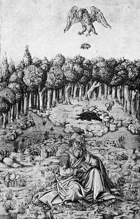 Illustration des Todes des Aeschylus in der Florentinischen Bilderchronik von Maso Finiguerra (15. Jh.). Das Original ist im Besitz des British Museum.